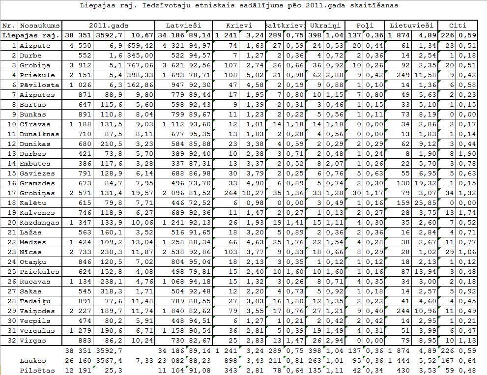 Latvijas 2011 gada tautas skaitīšanas dati